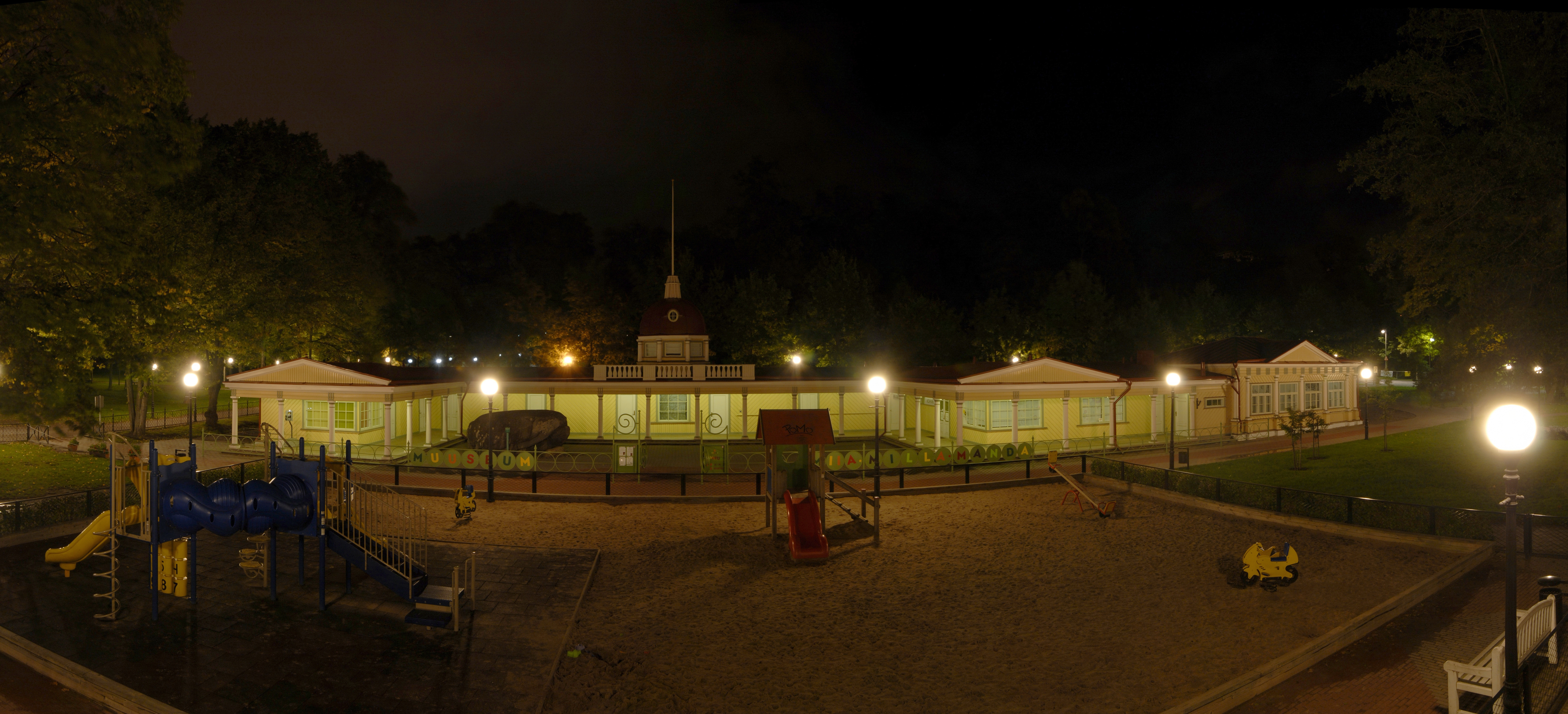 Harju maakond, Tallinna linn, Kesklinna linnaosa Lydia Koidula tn 21c